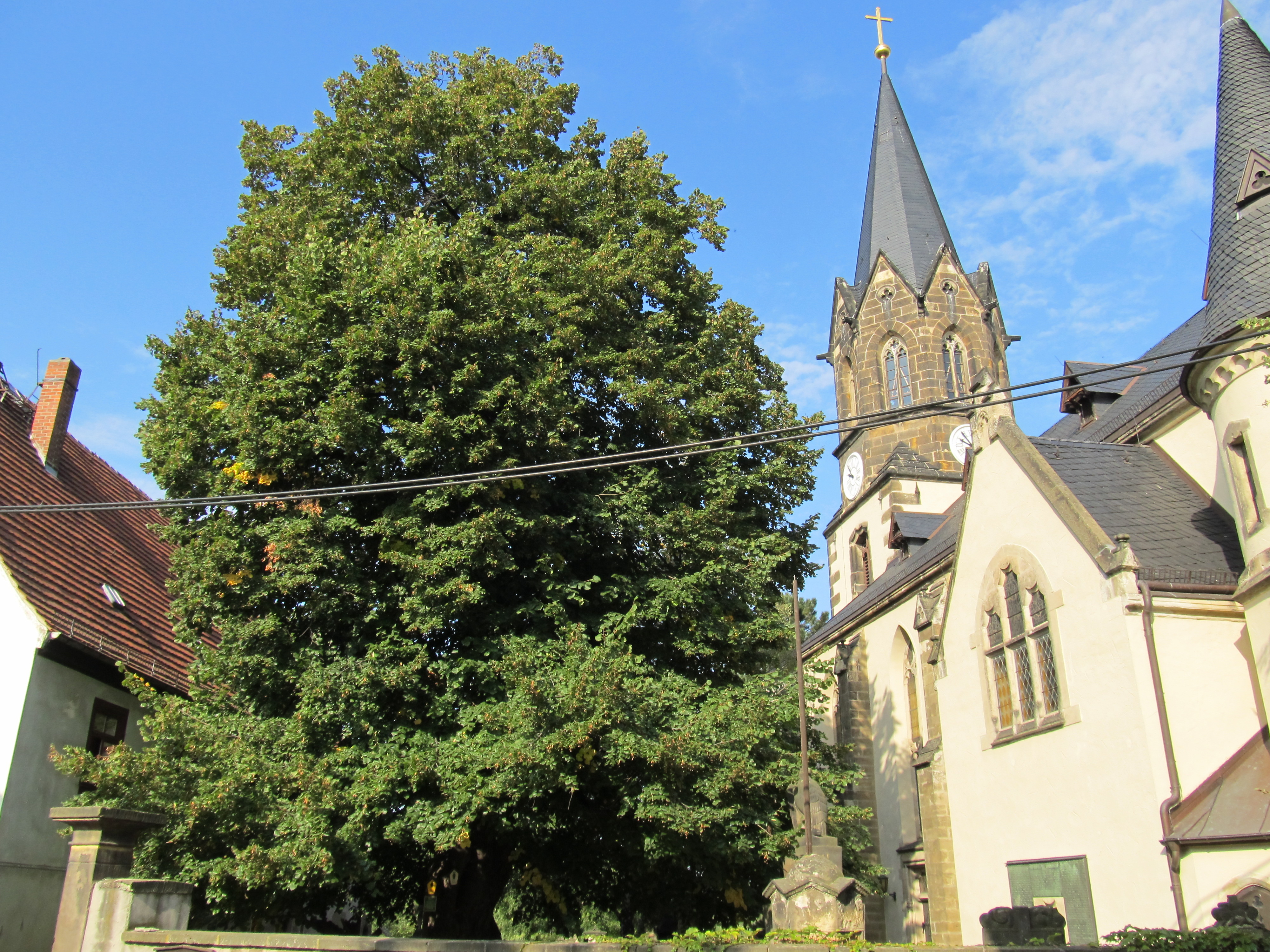 Kaditzer Linde, mit Emmauskirche, Dresden